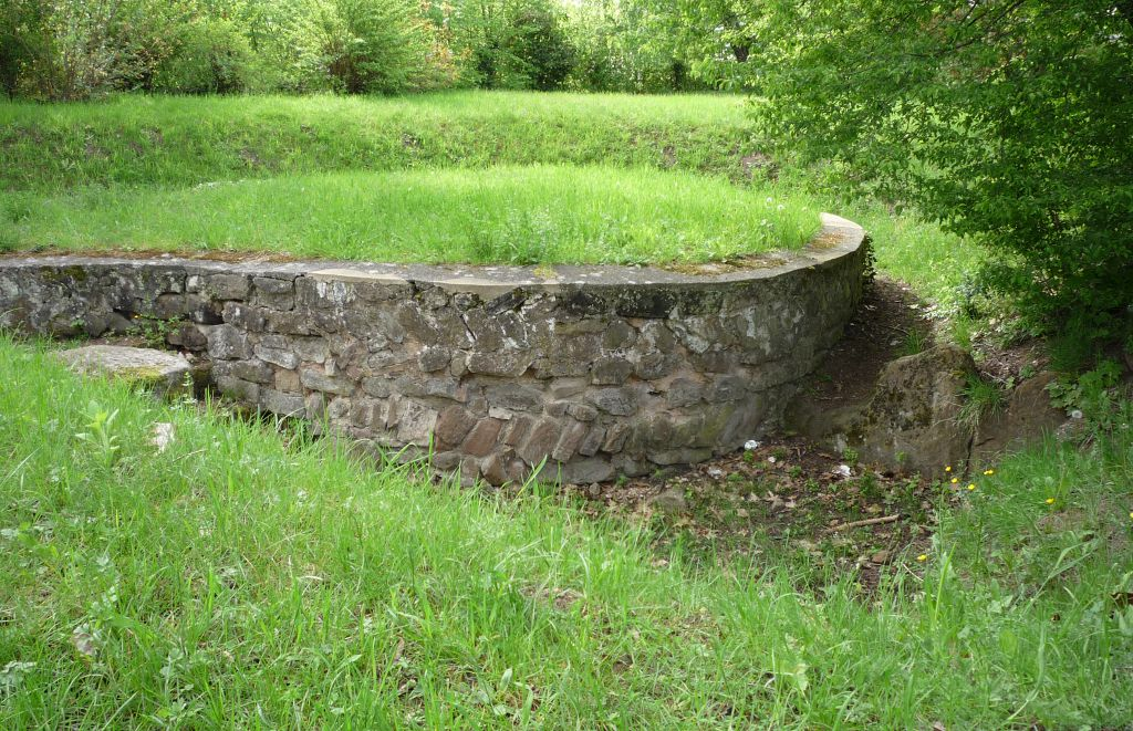 Römische Reste in Saarbrücken am Fuße des Halbergs (sog. Römerkastell) This is a photograph of an architectural monument. It is on the list of cultural monuments of Saarbrücken